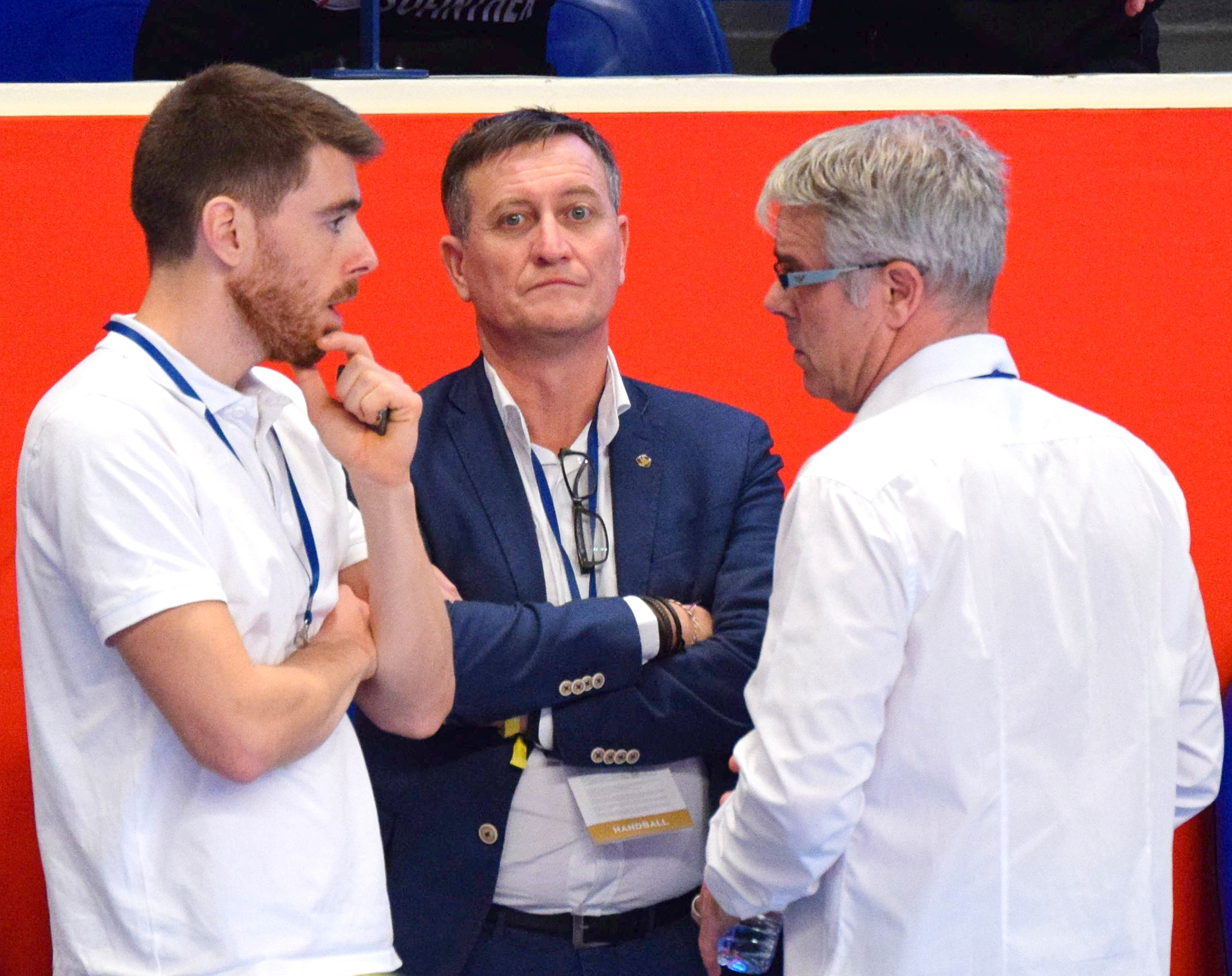 Gaël Pelletier (au centre), président du club HBC Nantes. Coubertin le 14 décembre 2017.